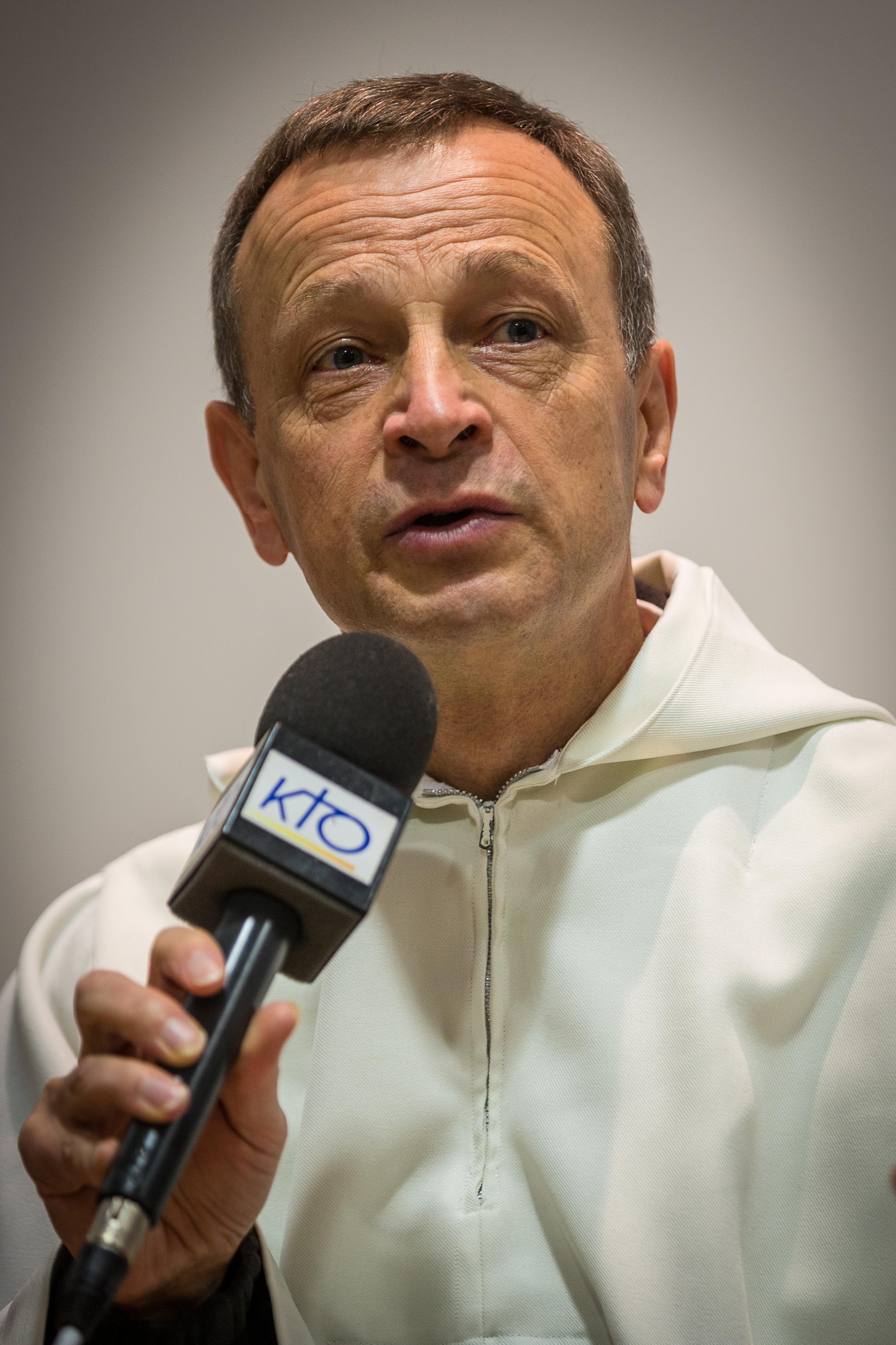 36e rencontres internationales de Taizé Strasbourg 28 décembre 2013